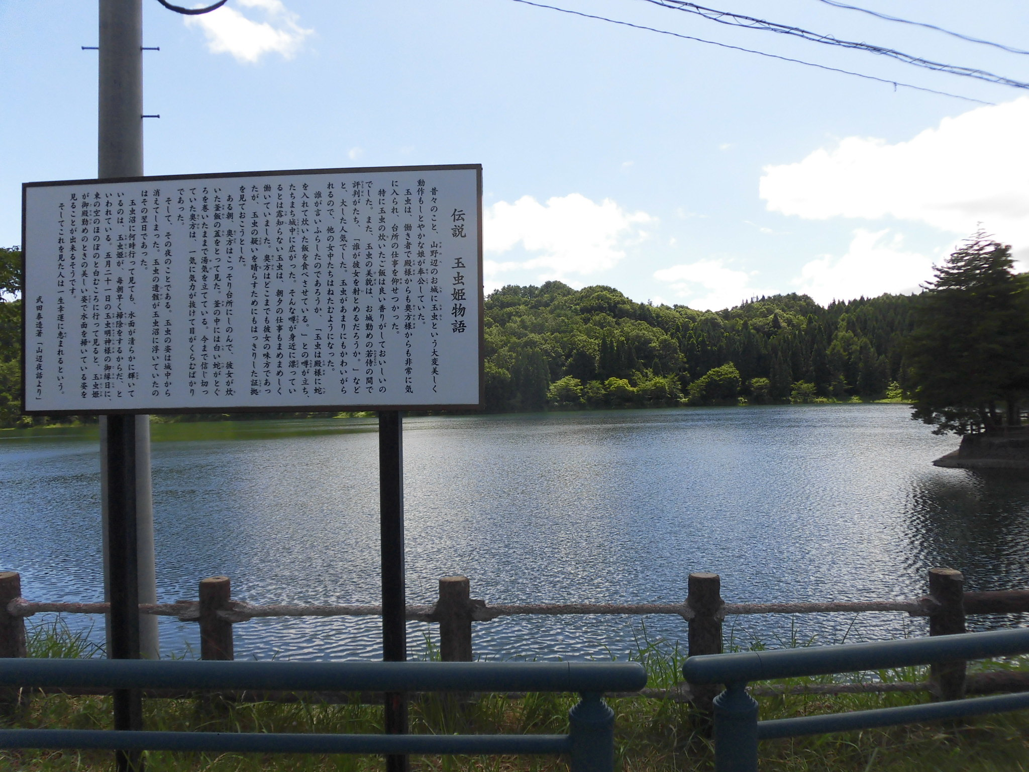 玉虫沼。山形県東村山郡山辺町大蕨に所在。室町時代の応永年間に築造された溜池。農林水産省ため池百選選定。玉虫姫の伝説が伝えられる。